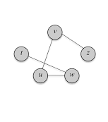 Graf sa 5 čvorova